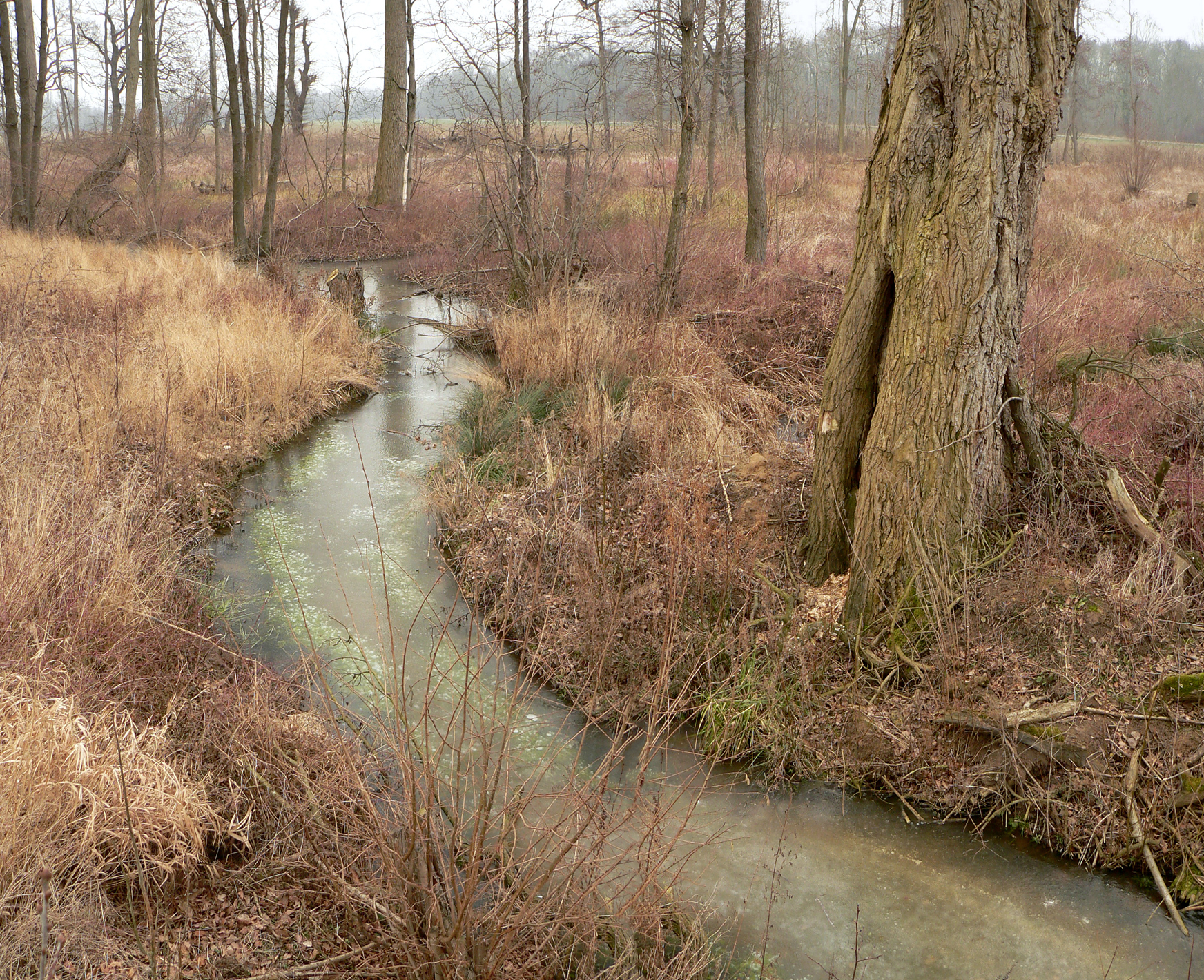 Niederungsgebiet mit der Dicken Riede in Wilkenburg, im Hintergrund der östliche Lagerbereich des römischen Marschlagers Wilkenburg